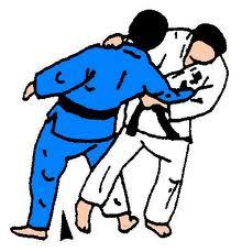 Técnica o soto gari